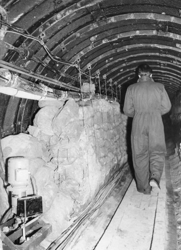 Zentralbild/Junge 24.4.1956 USA-Spionage-Tunnel unter DDR-Gebiet Der amtierende Militärkommandant des sowjetischen Sektors von Berlin, Oberst Kozjuba, gab am Montagabend (23.4.1956) auf einer Pressekonferenz vor zahlreichen in- und ausländischen Journalisten bekannt, dass am 22.4.1956 von sowjetischen Truppen eine amerikanische Abhörzentrale im demokratischen Sektor Berlins ausgehoben wurde. Amerikanische Stellen hatten im Gebiet von Alt-Glienicke einen etwa 300 m langen Stollen angelegt, der zu den Fernmeldelinien der sowjetischen Truppen sowie zu den Fernmeldelinien der Deutschen Demokratischen Republik lief. Durch die Stollen ziehen sich Kabelleitungen, die vom amerikanischen Sektor ausgehen und an die Kabelleitungen der sowjetischen Truppen anschlossen wurde. Im Anschluß an die Pressekonferenz fand eine Besichtigung der anerikanischen Abhörzentrale statt. UBz.: Einen Einblick von der Größe des Tunnels gibt diese Aufnahme. (ganz links) eine der in bestimmten Abständen aufgestellten Wasserpumpen.